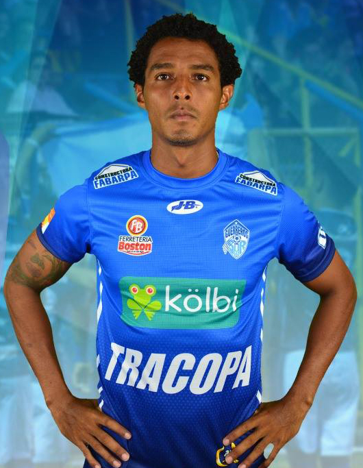 Porfirio López en su presentación oficial con el Pérez Zeledón en 2017.